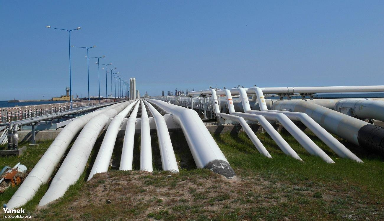 Gdańsk Stogi. Rurociągi z(do) Bazy Paliwowej Portu Północnego. Połączone są ze zbiornikami w Rafinerii Gdańskiej, w Porcie Północnym oraz z wielkimi zbiornikami na Krakowcu, które nie wiedzieć czemu na google maps oznakowane sa jako oczyszczalnia Gdańsk-Wschód.